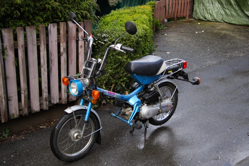 1982 Honda Express (NC50)